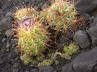 Melocactus Guitarti de León.